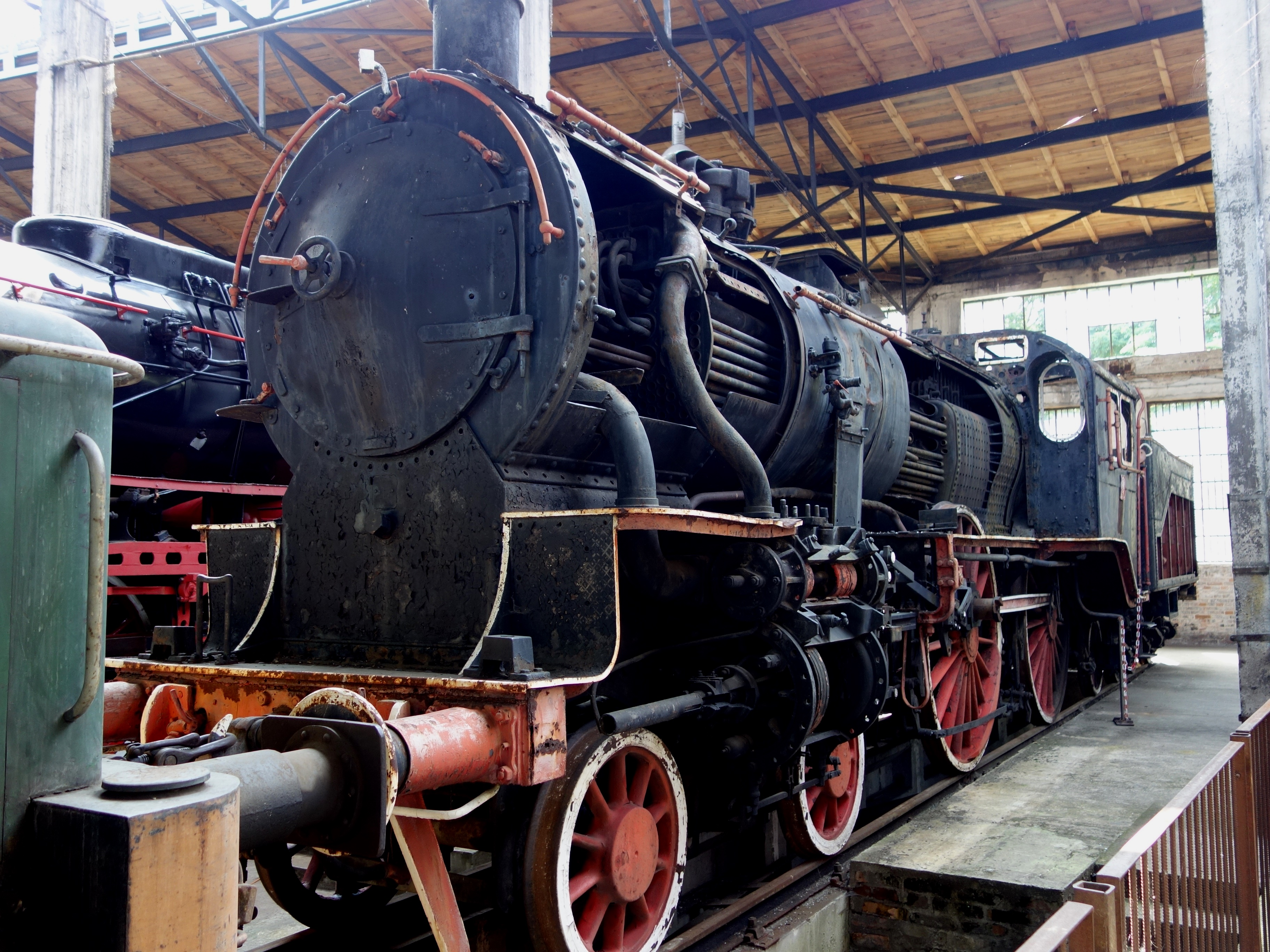 Der Polskie Stowarzyszenie Miłośników Kolei (PSMK, Polnischer Verein der Eisenbahnfreunde) hat die Lok vom Technikum Kolejowe Warszawa (Eisenbahn-Technikum Warschau) übernommen, wo sie zu Schulungszwecken mit sichtbaren Kesselrohren ausgestellt war, und sie in seine Fahrzeugsammlung im Museum "Ringlokschuppen Skierniewice" eingereiht. Sie wurde gebaut von den Linke-Hoffmann-Werken in Breslau (Fabrik-Nr. 934) und 1912 an die KPEV (Königlich Preußische Eisenbahn-Verwaltung) abgeliefert.